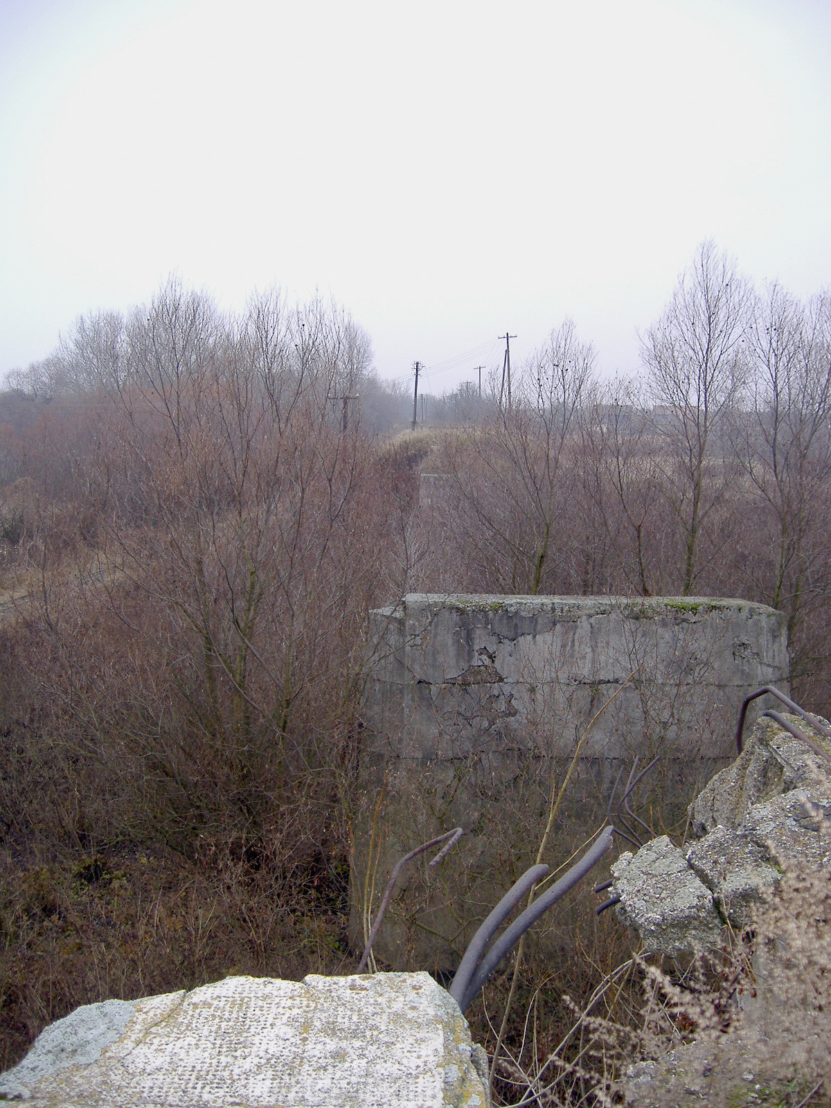 A Nyírvidéki Kisvasút Tisza-hídjának romjai Balsánál